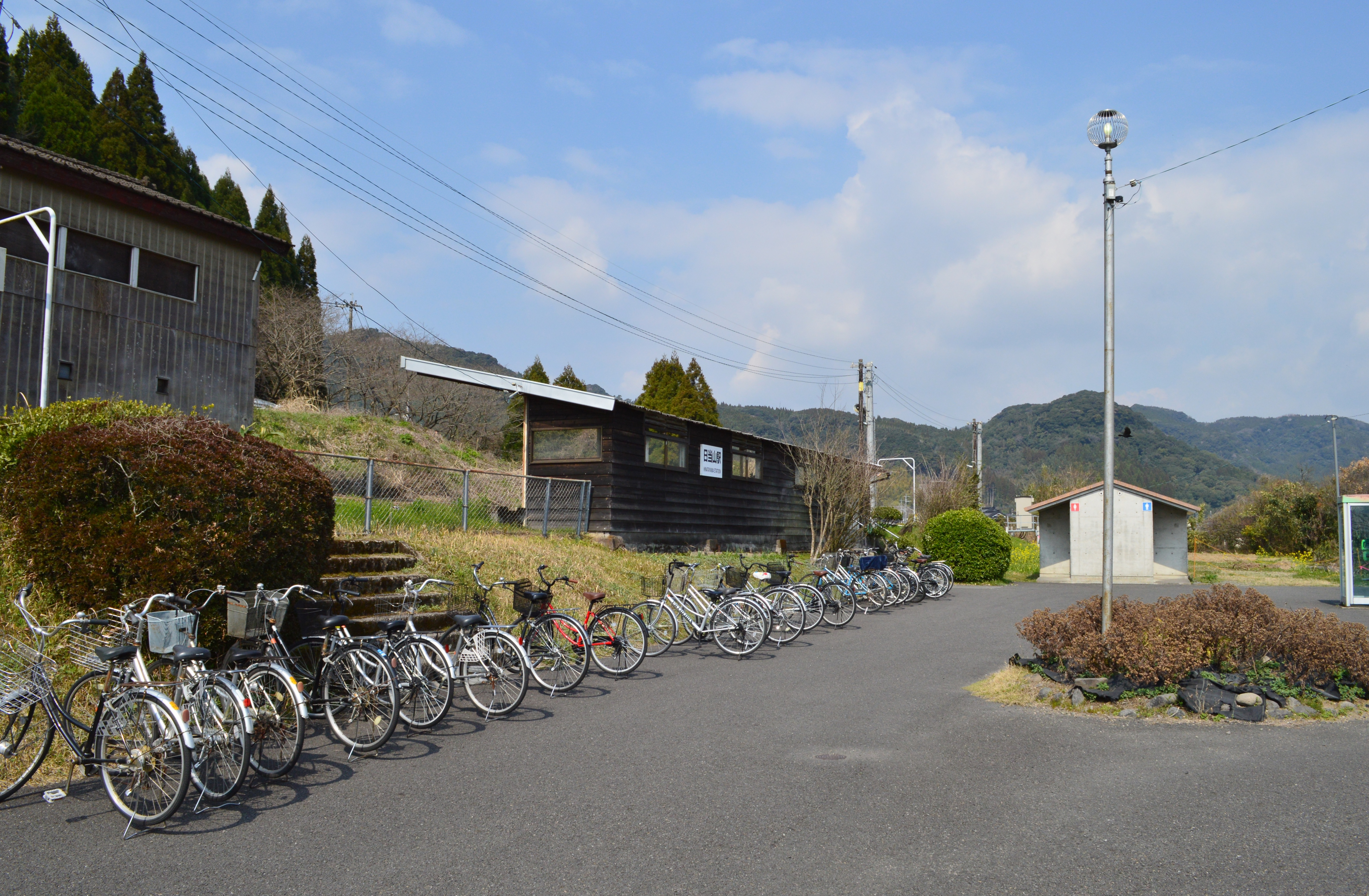 日当山駅 駅前